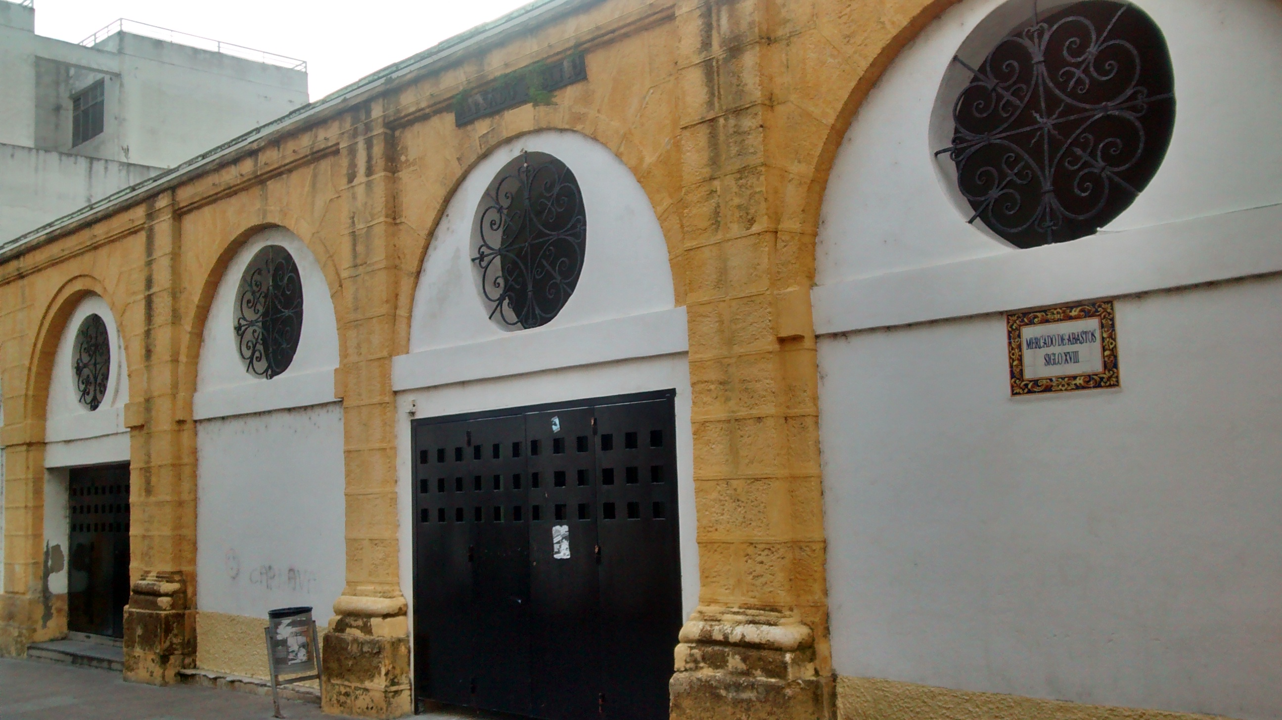 Mercado de abastos de Puerto Real (España)